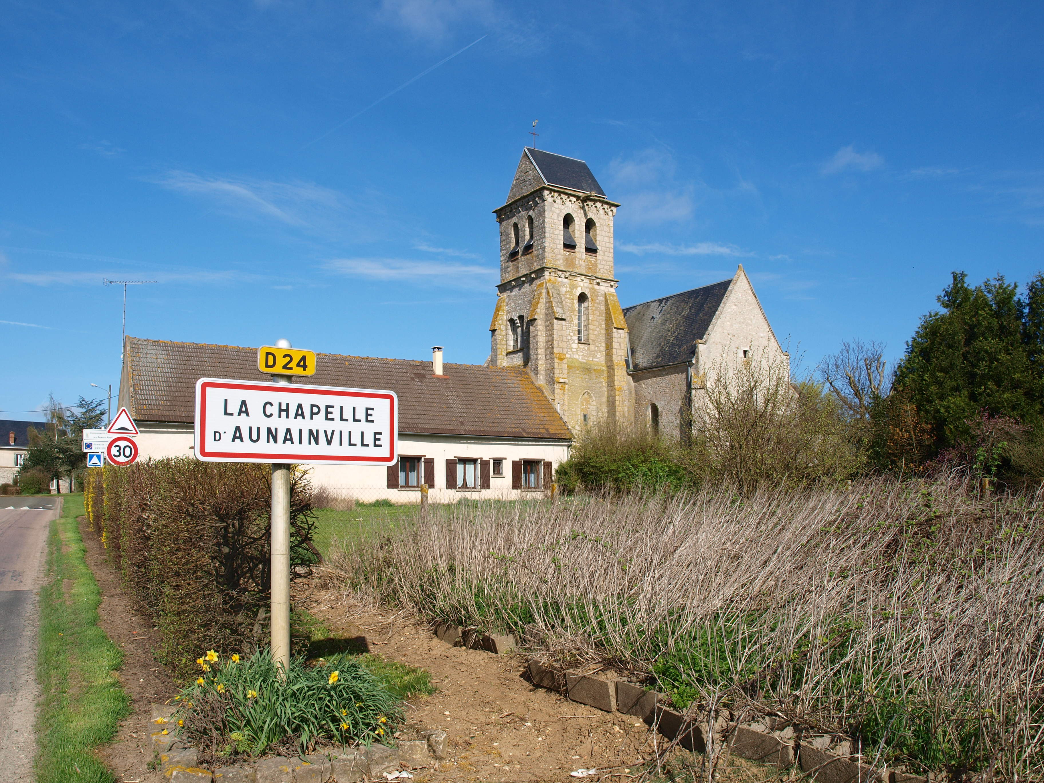 La Chapelle-d'Aunainville (Eure-et-Loir, France)